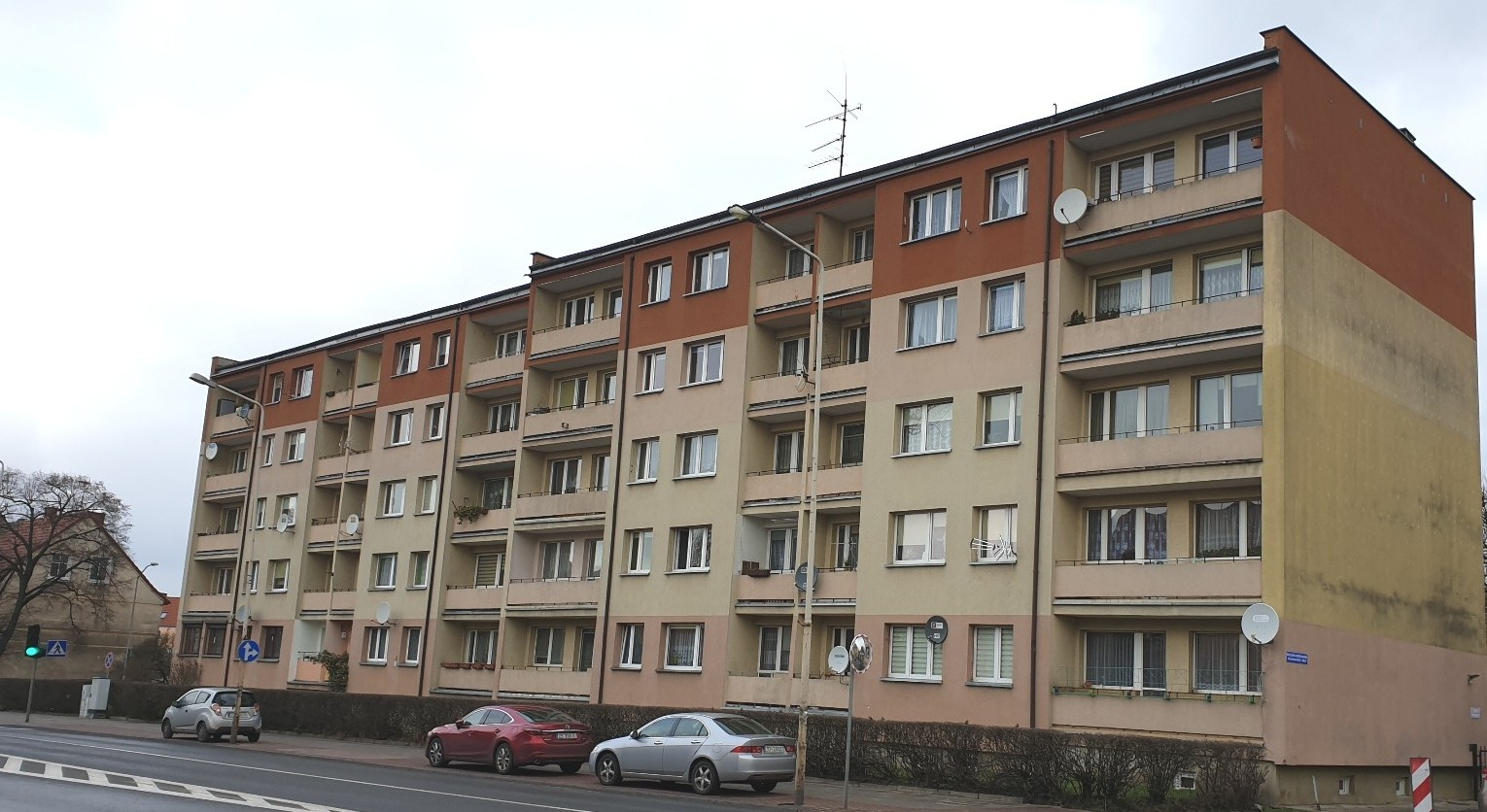 Stargard. Budynek mieszkalny byłego Luxpolu